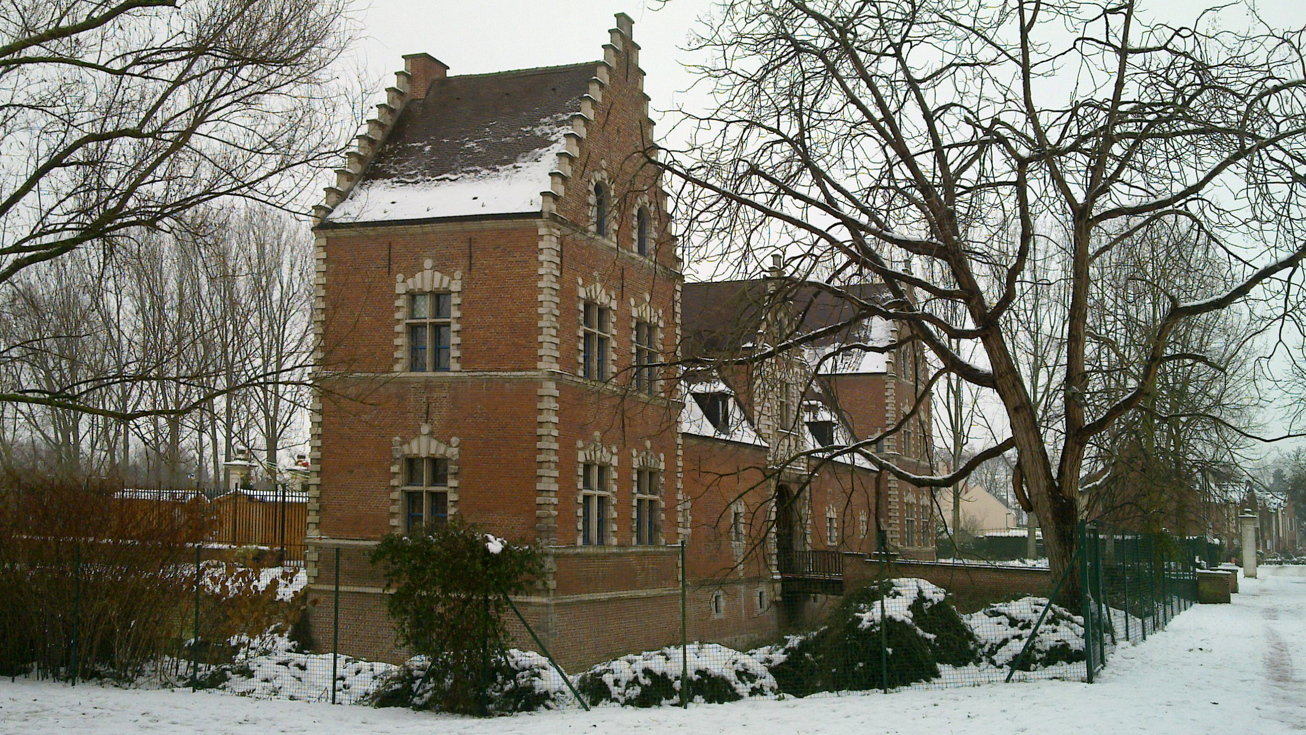 Le château de Flers dans la neige l'hiver, à Villeneuve d'Ascq.